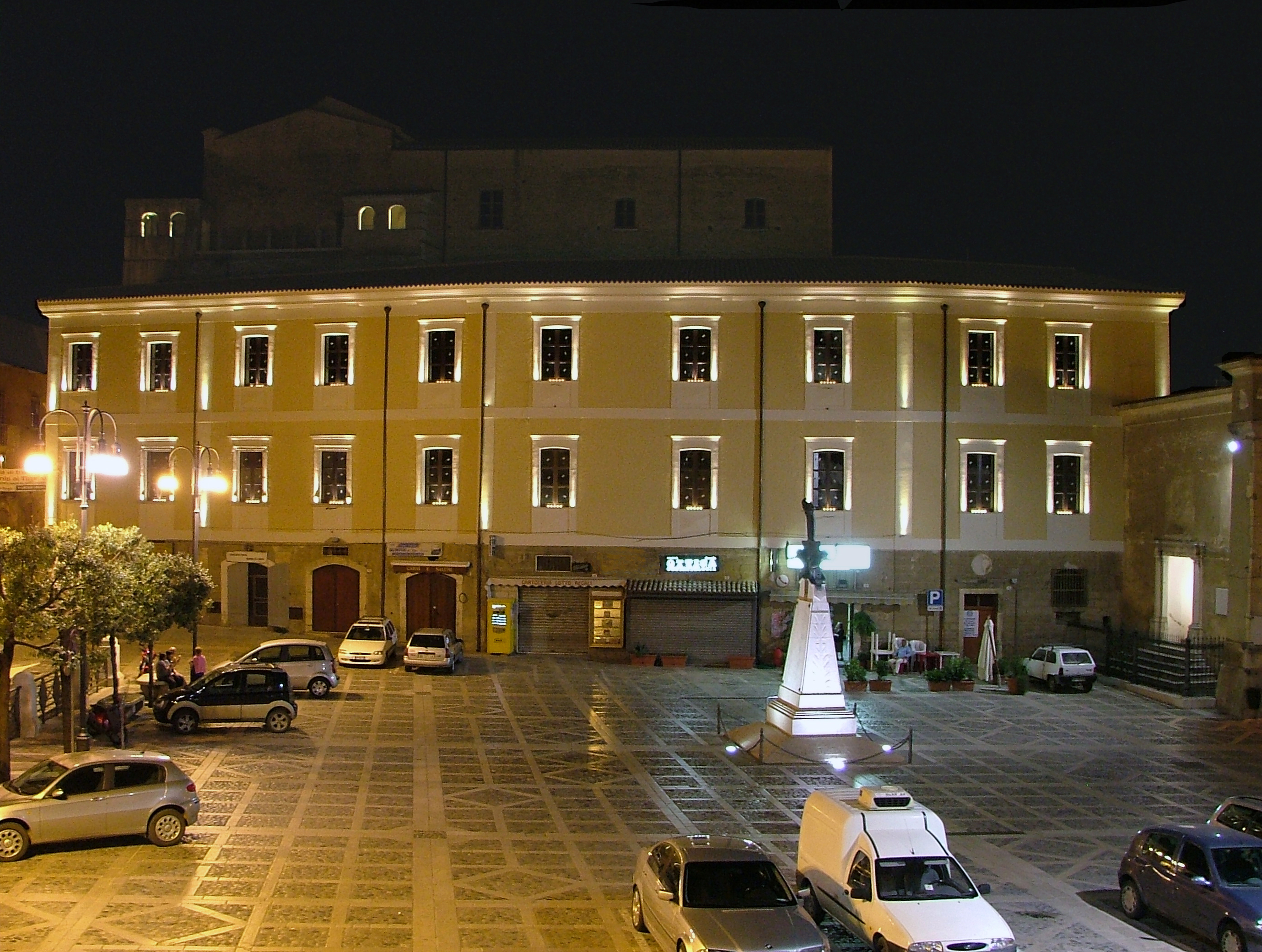 Autore: Rocco Stasi. Fonte: fatta da me. Ala del palazzo ducale che si affaccia su piazza Garibaldi GFDL, sono l'autore